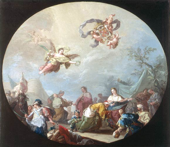 La rendición de Granada